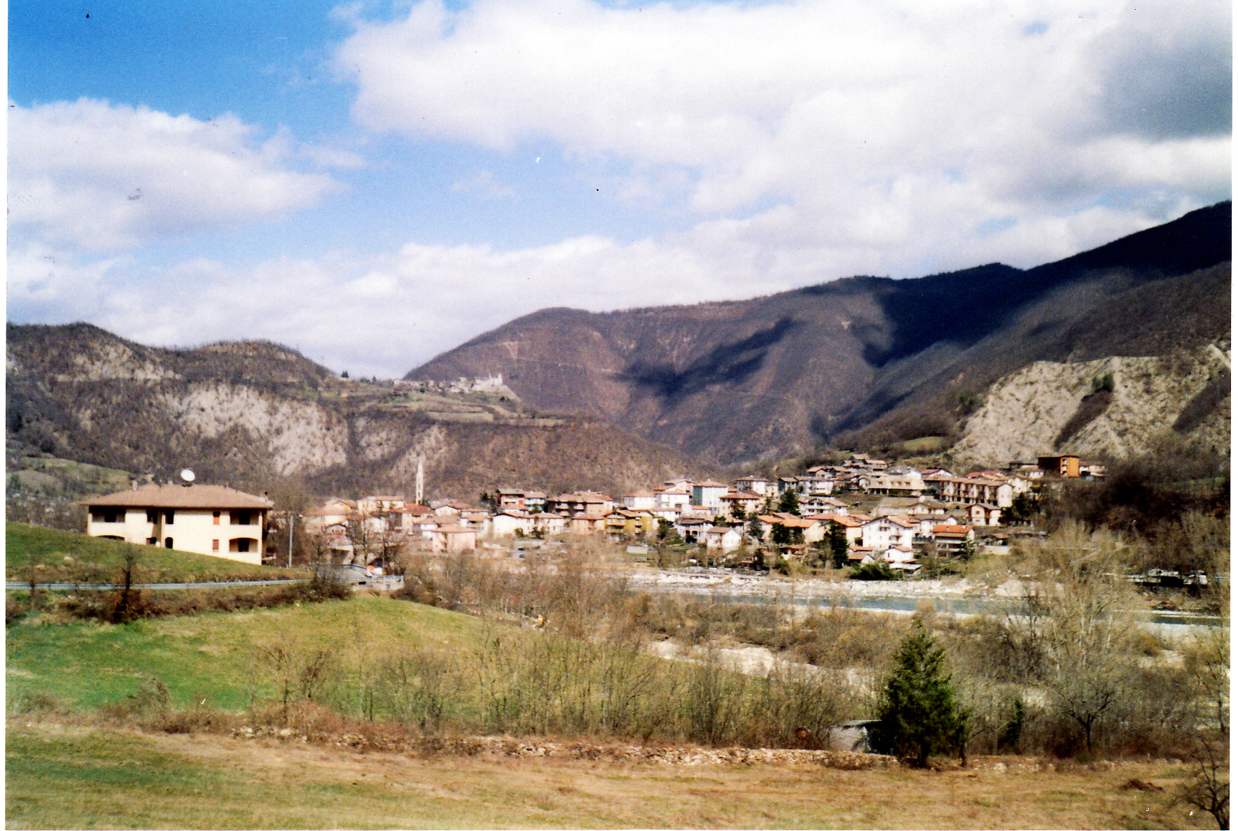 Panorama di Marsaglia e Brugnello di Cortebrugnatella